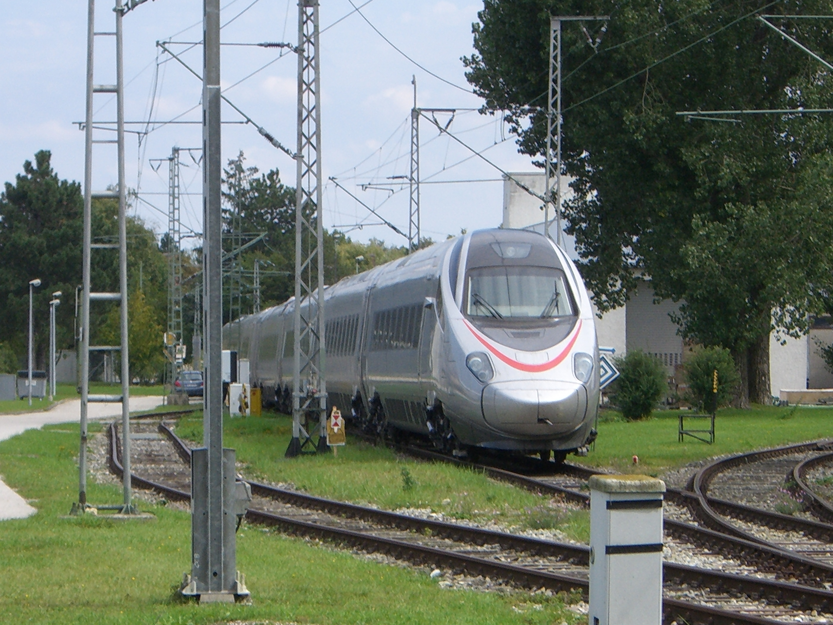 München - ETR 610 im DB-Ausbesserungswerk München-Freimann 2.jpg